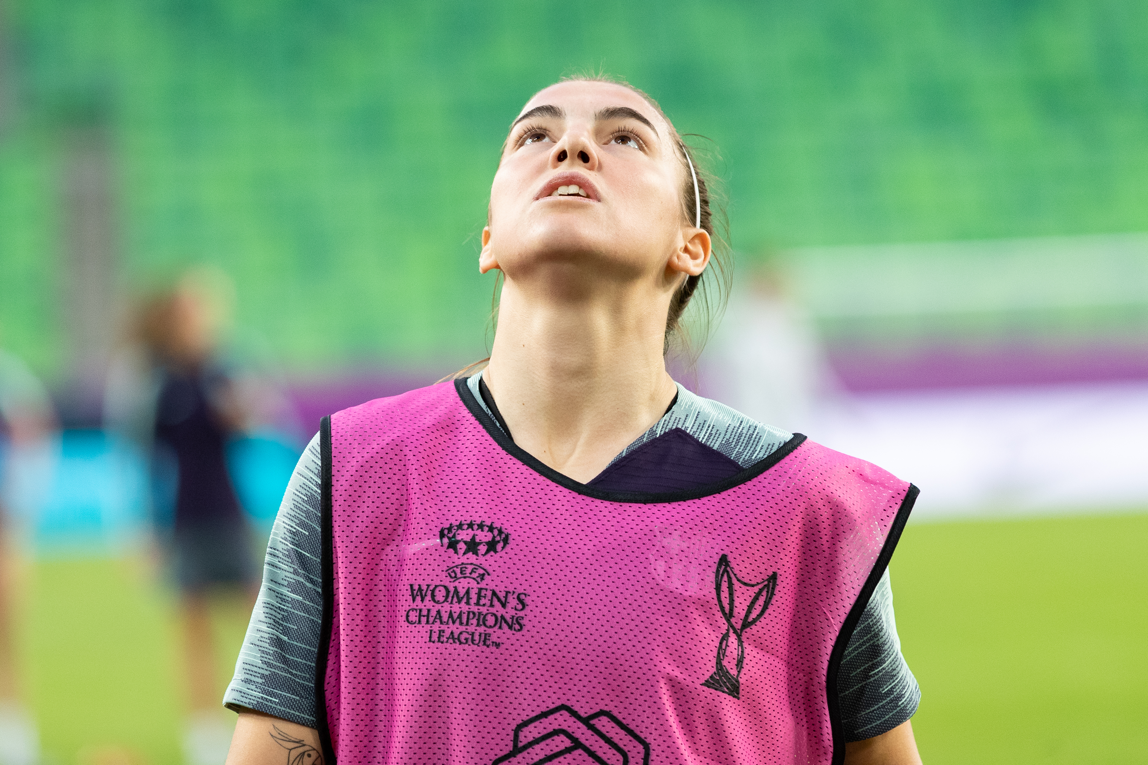 Fußball, Frauen, UEFA Women's Champions League, Olympique Lyonnais - FC Barcelona; Patricia Guijarro (FC Barcelona, 12) beim Abschlusstraining